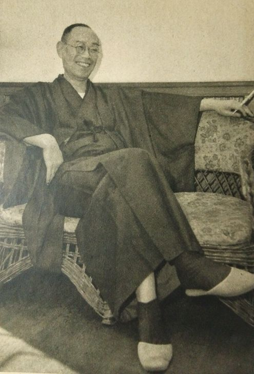 岩渕辰雄